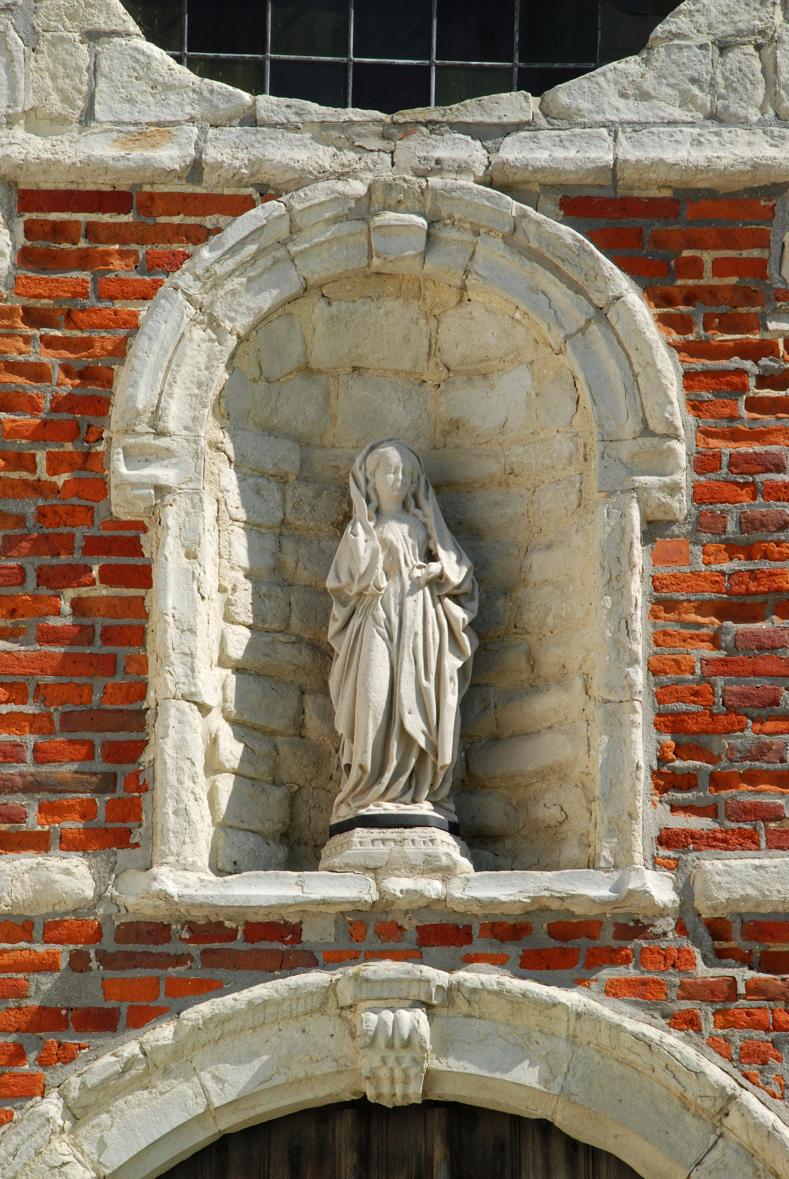 Belgique - Brabant wallon - Genappe - Chapelle du Chantelet